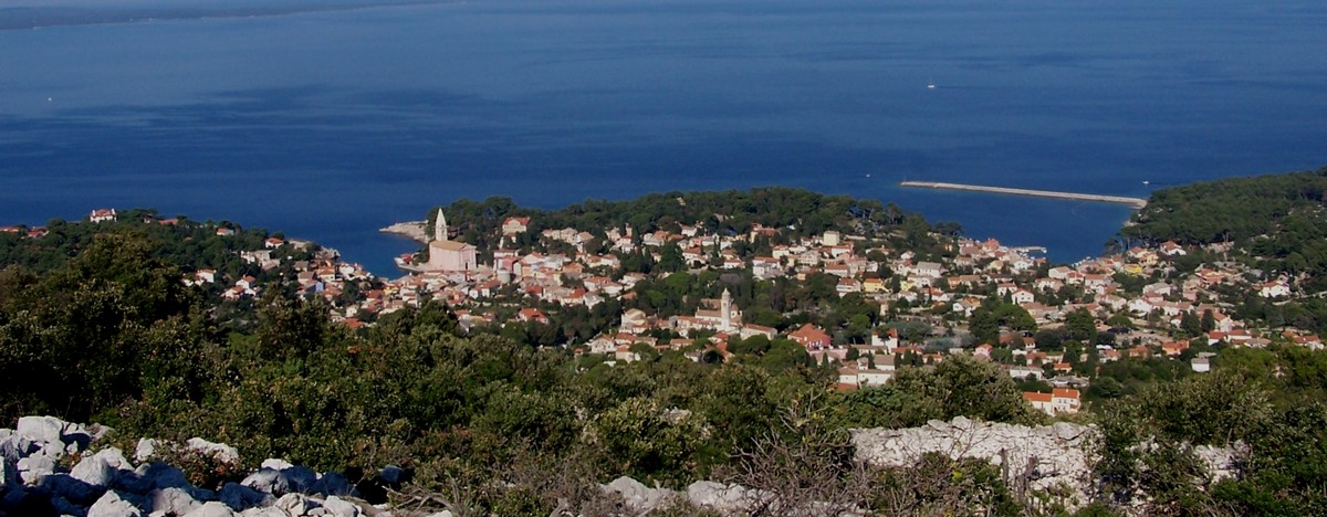 Veli Losinj 2012 Panorama